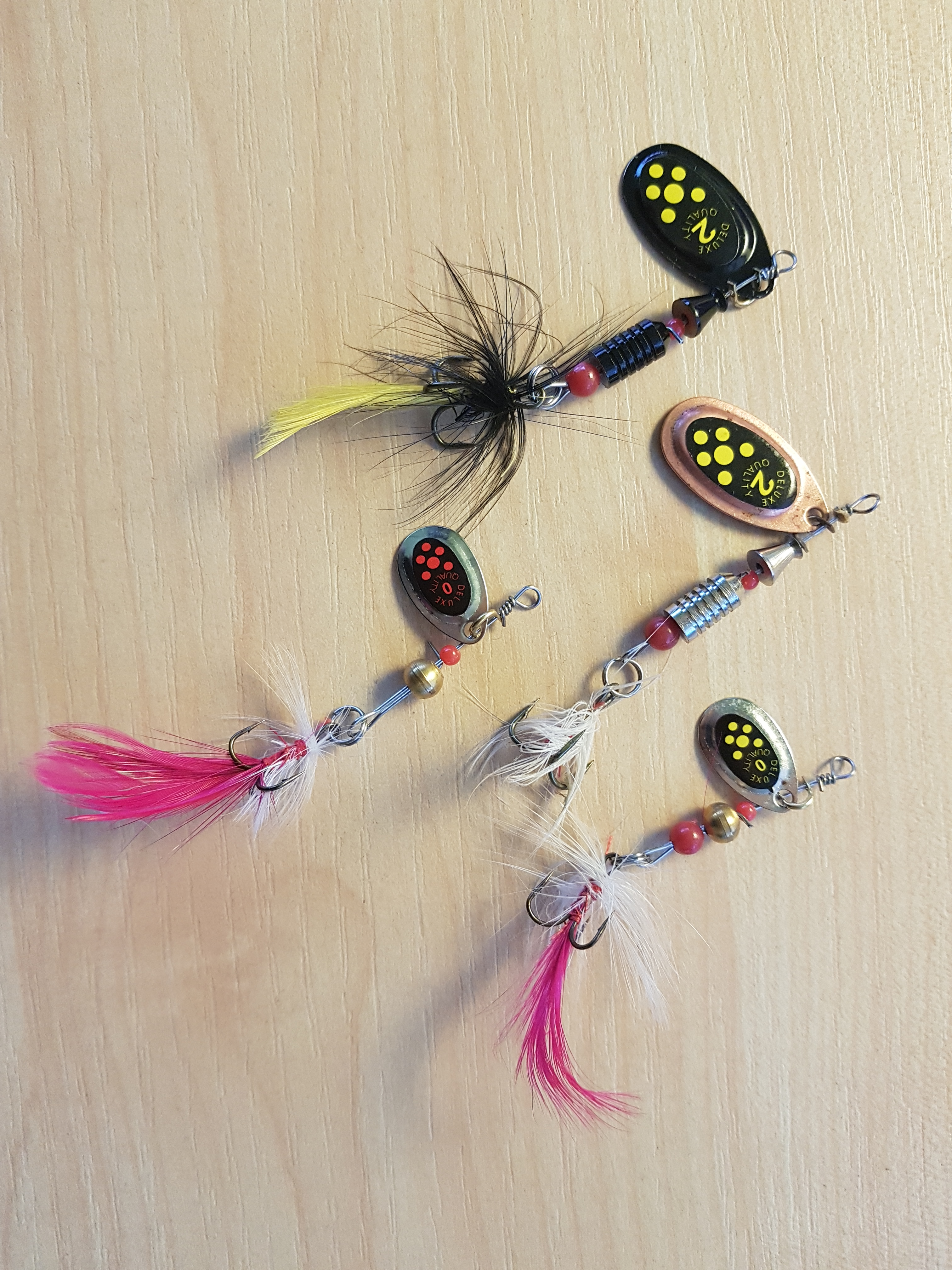 Landid kala püüdmiseks